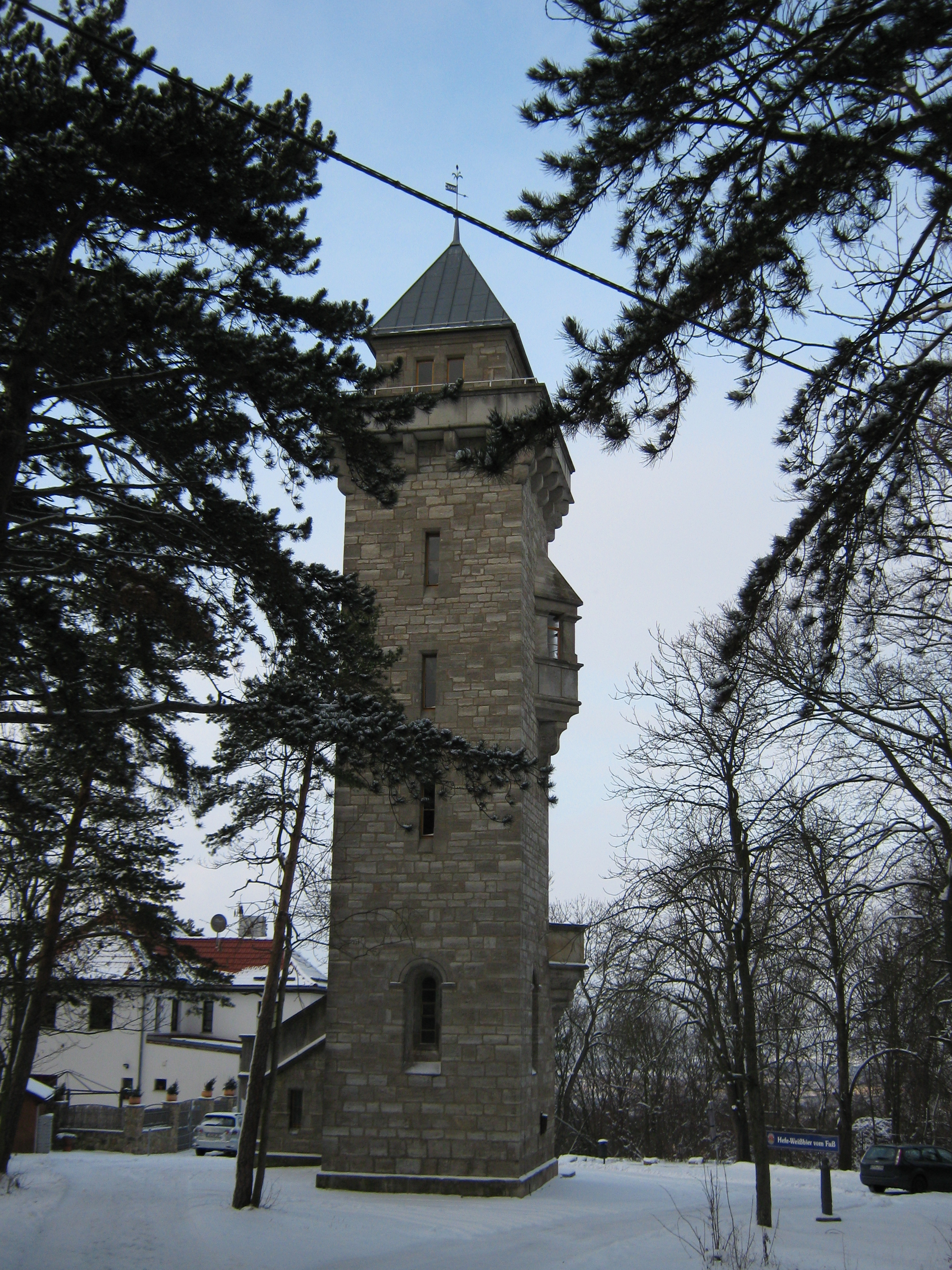 Der Alteburgturm oberhalb von Arnstadt (Deutschland).